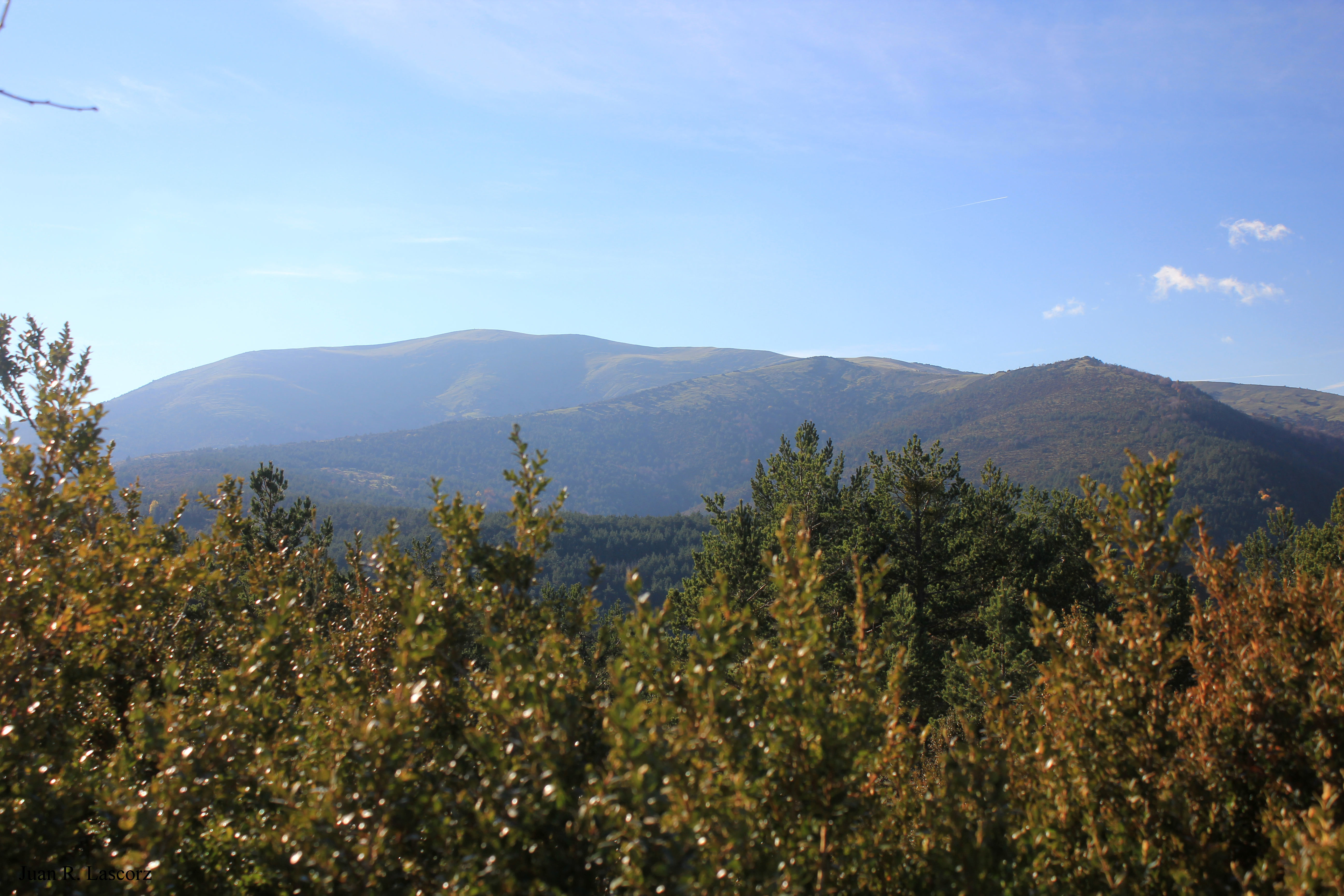 Aragonés: A Oturía (izquierda) y a suya estribación, o cerro d'a Estiva (dreita), dende o cerro de Sant Blas (aman de Basarán). O sarrato chicorrón que queda debaixo (entre os buixos) ye o mont que en dicen Sarradiblo. Astí debaixo ye a on naixe o barranco de Bergusa.